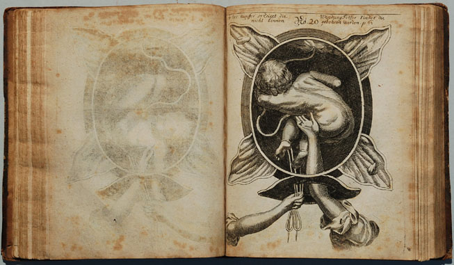 Gedoppelter Handgriff der Justine Siegemundin, erstmals publiziert 1690. Kupferstich aus der 2. Auflage ihres Lehrbuches von 1723.